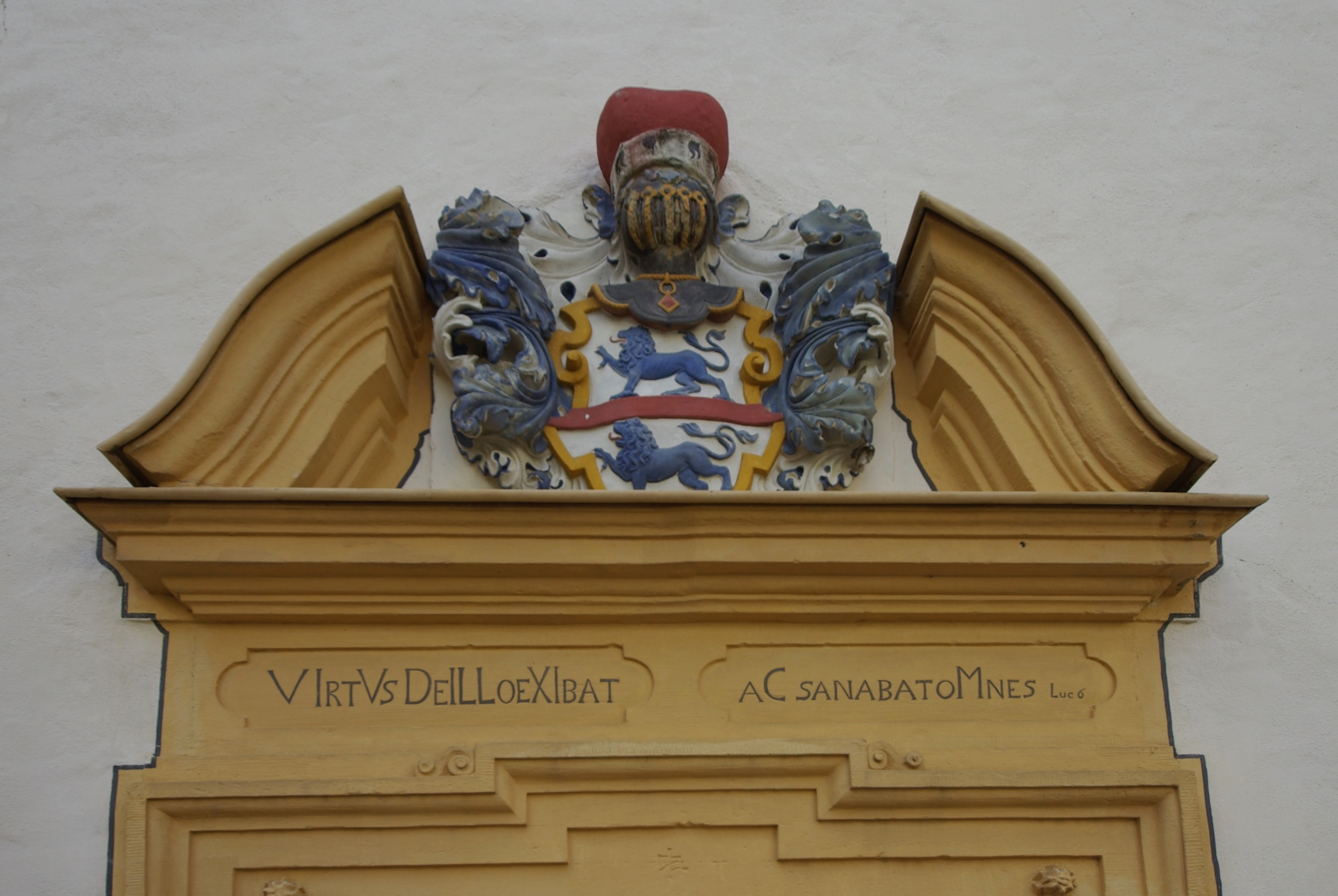 Schloss Greifenstein in der Fränkischen Schweiz, Familienwappen der Schenk von Stauffenberg, darunter der Satz virtus de illo exi[e]bat ac sanabat omnes (Und die Kraft des Herrn ging von ihm, und er half jedermann.) aus dem Evangelium nach Lukas, Kapitel 6